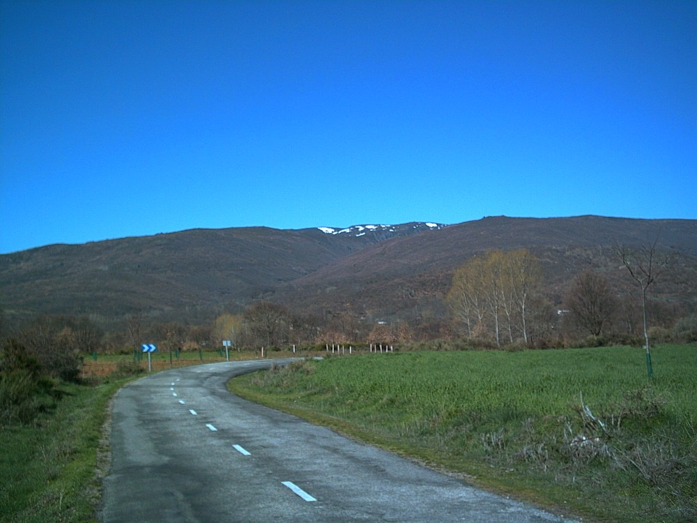 Vista desde ALto de Castro, cerca de Cobreros (Zamora, España). Tomada 2006-04-18.